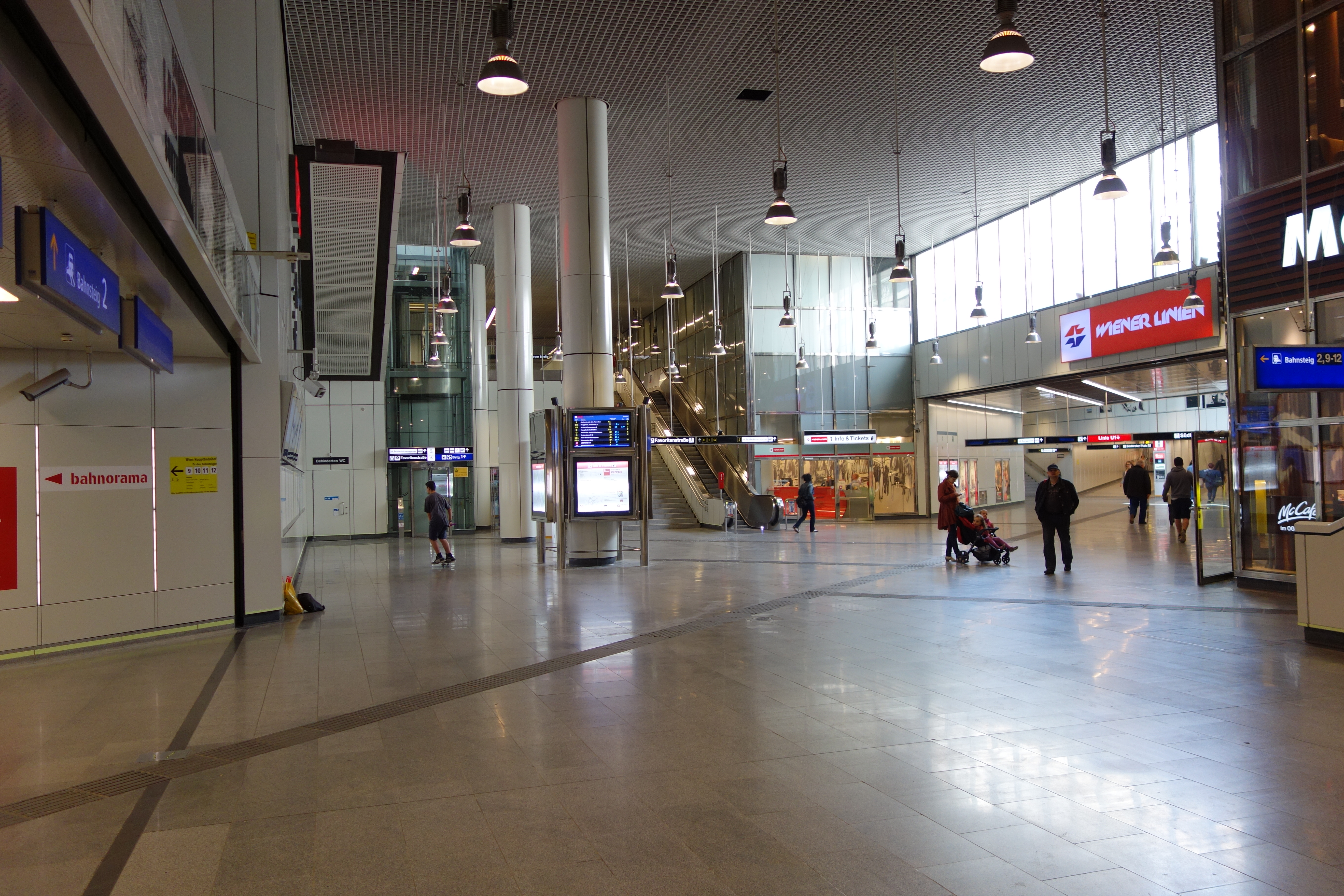 Die unterirdische Verteilerpassage am Wiener Hauptbahnhof im Juni 2014. Das Bild zeigt den Übergang zwischen dem Bereich der Wiener Linien und den ÖBB. Durch die Verglasung rechts oben ist die Rampe der U-Straßenbahn zu sehen, die den Bereich auch mit Tageslicht versorgt. Links oben (nicht im Bild) befindet sich ebenfalls eine Glasfläche. Durch sie kann die S-Bahn Stammstrecke beobachtet werden.